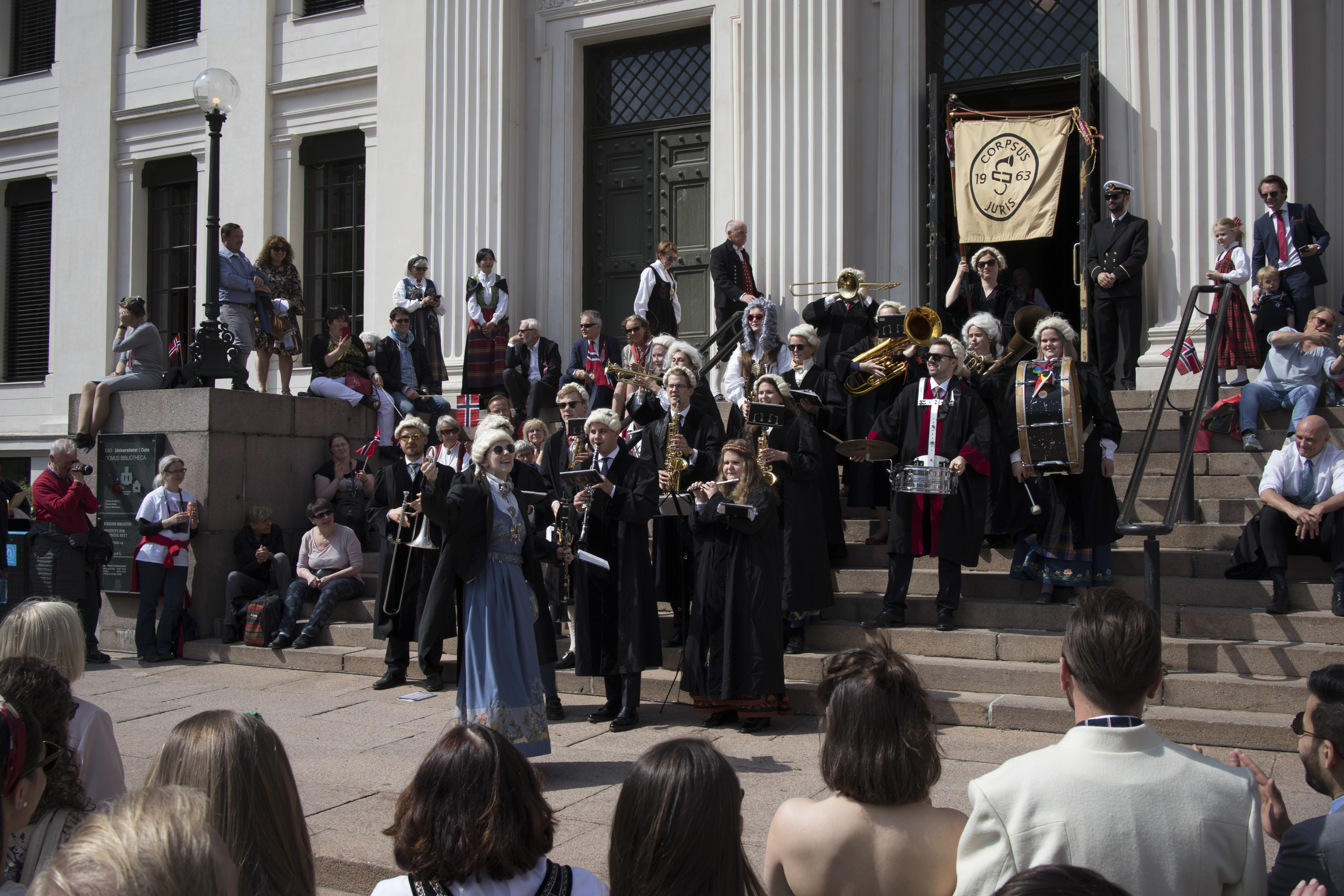 Corpsus Juris spiller 17.mai konsert på Universitetsplassen i Osloi 2018.